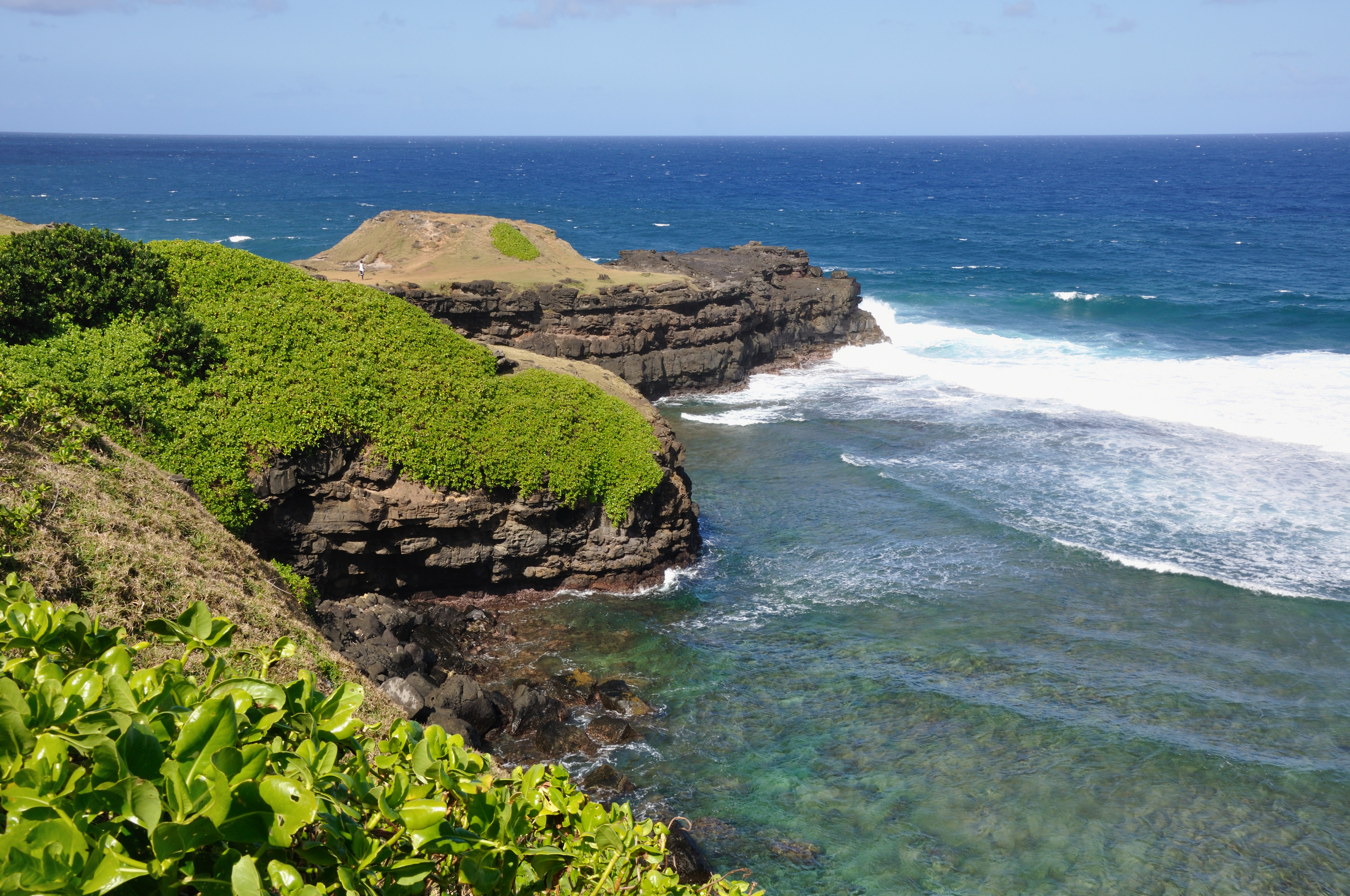 Mauritius, La roche qui pleure, Souillac